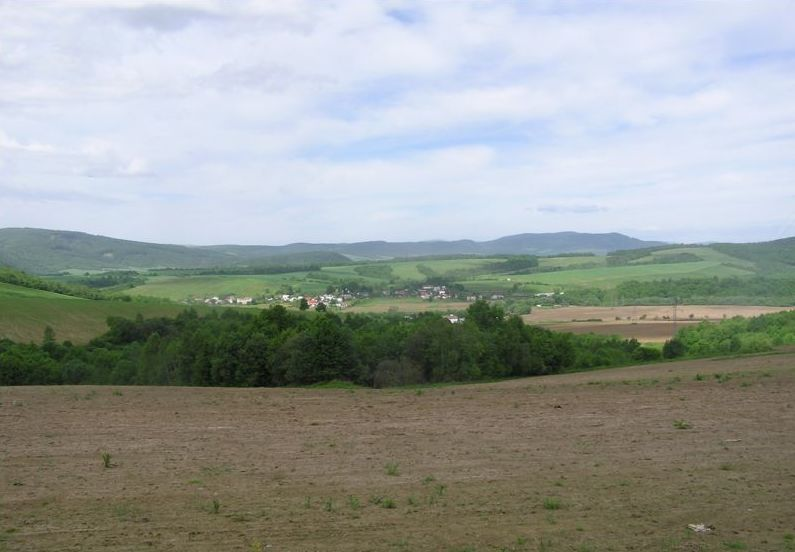 Celkový pohľad